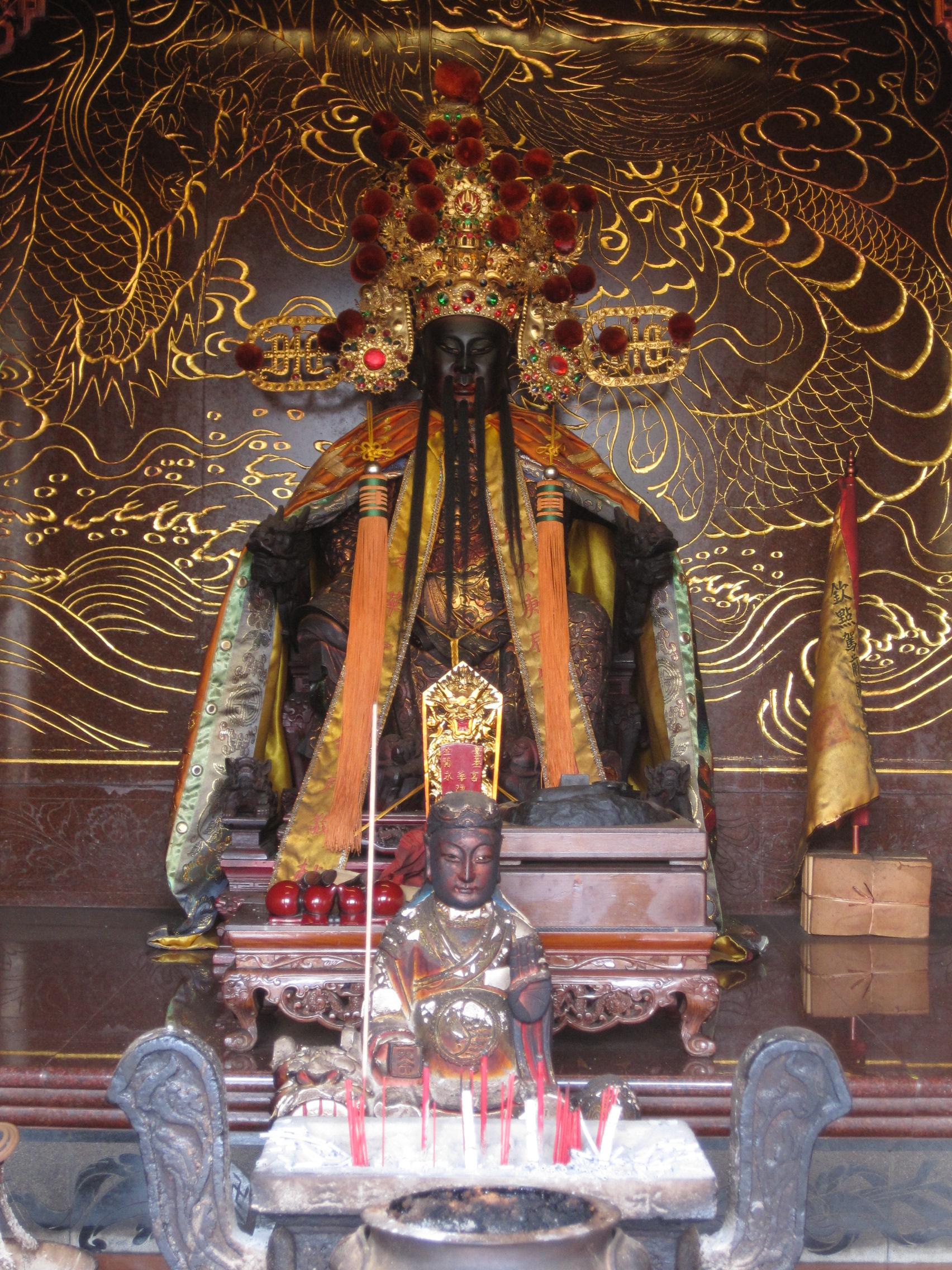 臺南永華宮所供奉的陳永華神像